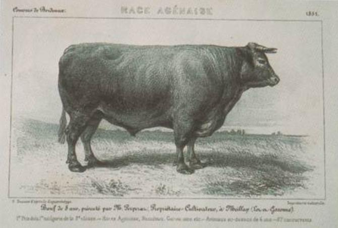 gravure d'un "Boeuf de race agenaise âgé de 8 ans" lors du concours d'animaux de boucherie de Bordeaux en 1858.